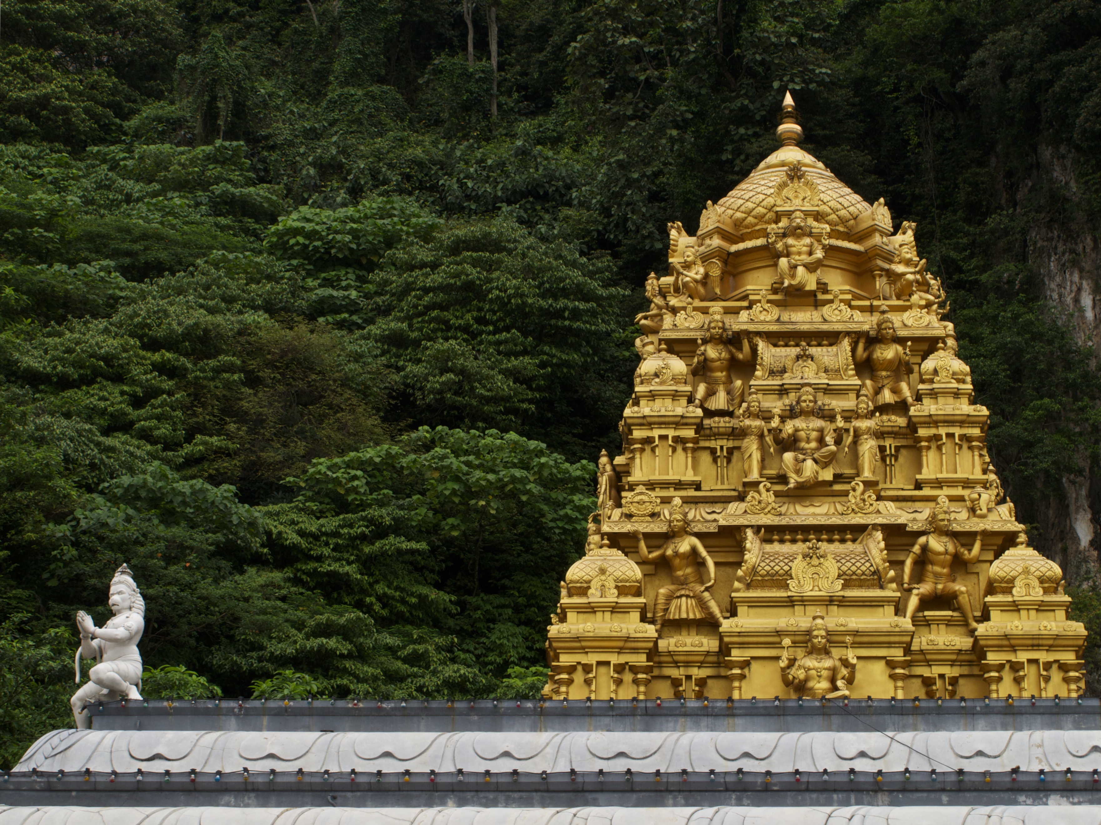 Temple entrance decoration